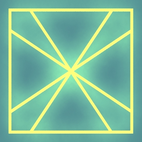 Самая простая мандала. Чтобы войти в транс, просто долго посмотри на неё.